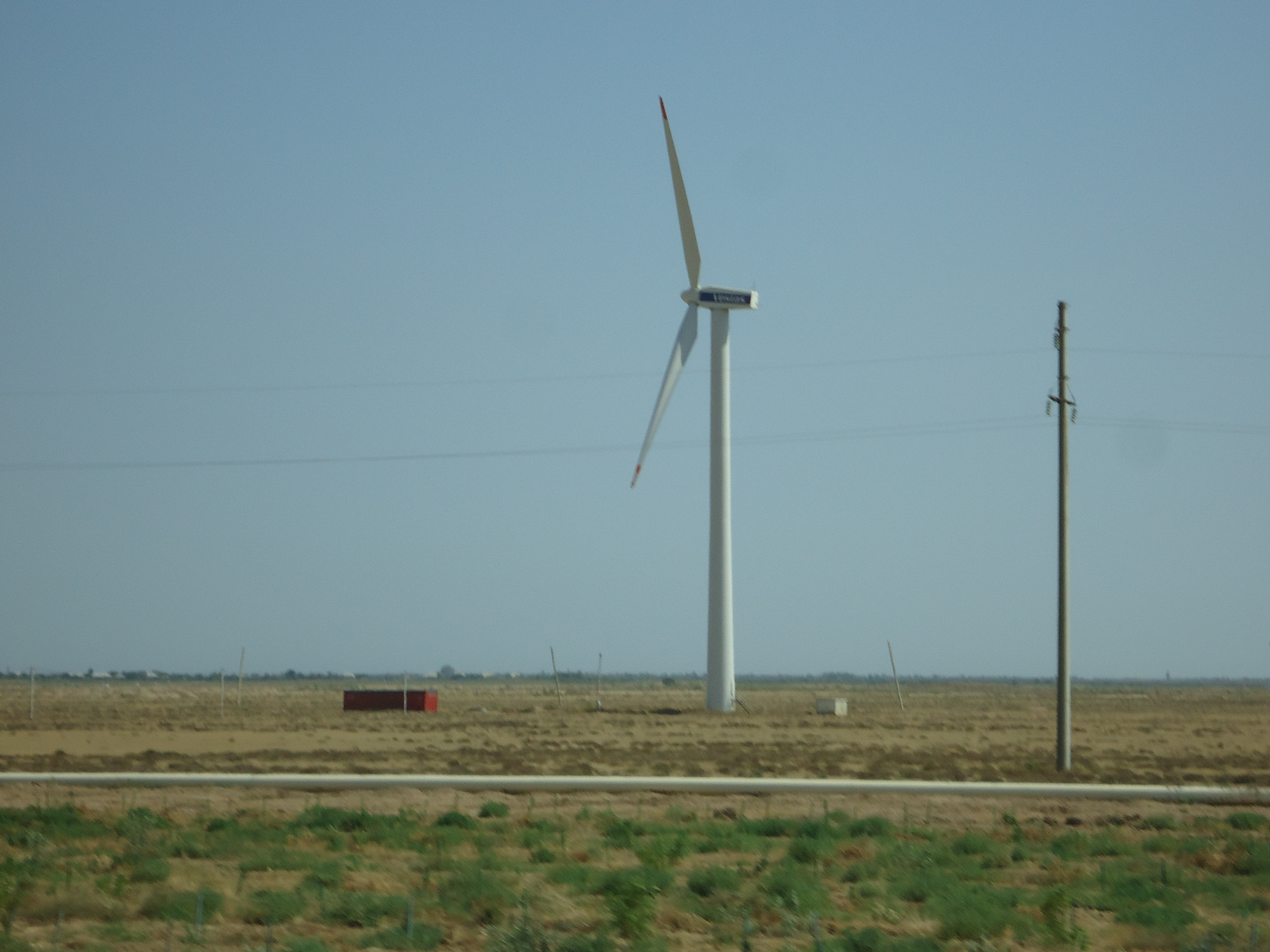 İqlim ehtiyatı-Külək mühərriyı.